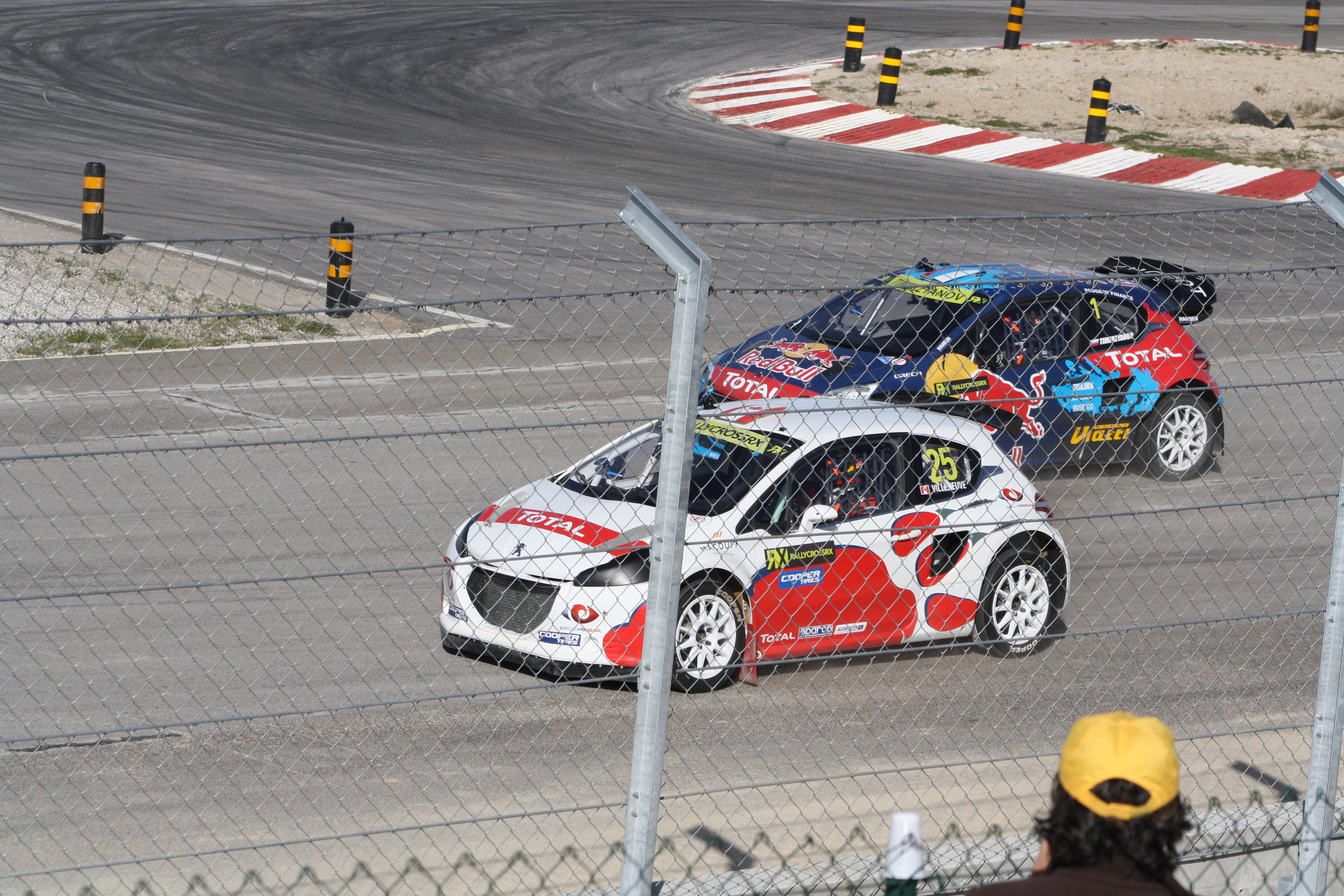 Jacques Villeneuve en Portugal la primera ronda del Campeonato del Mundo de Rallycross.